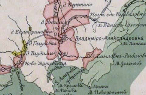 Фрагмент карты Уссурийского края 1899 года, район залива Америка